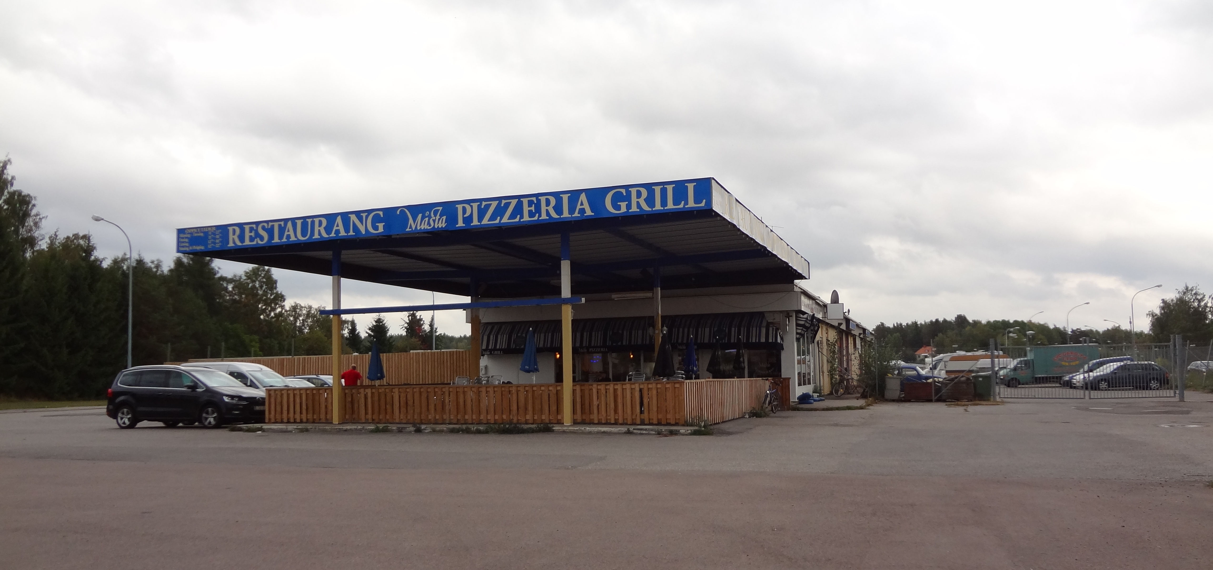 Centrum med pizzeria och bilmekaniker i stadsdelen Måsta i Eskilstuna.